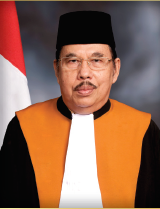 Hakim Agung Republik Indonesia